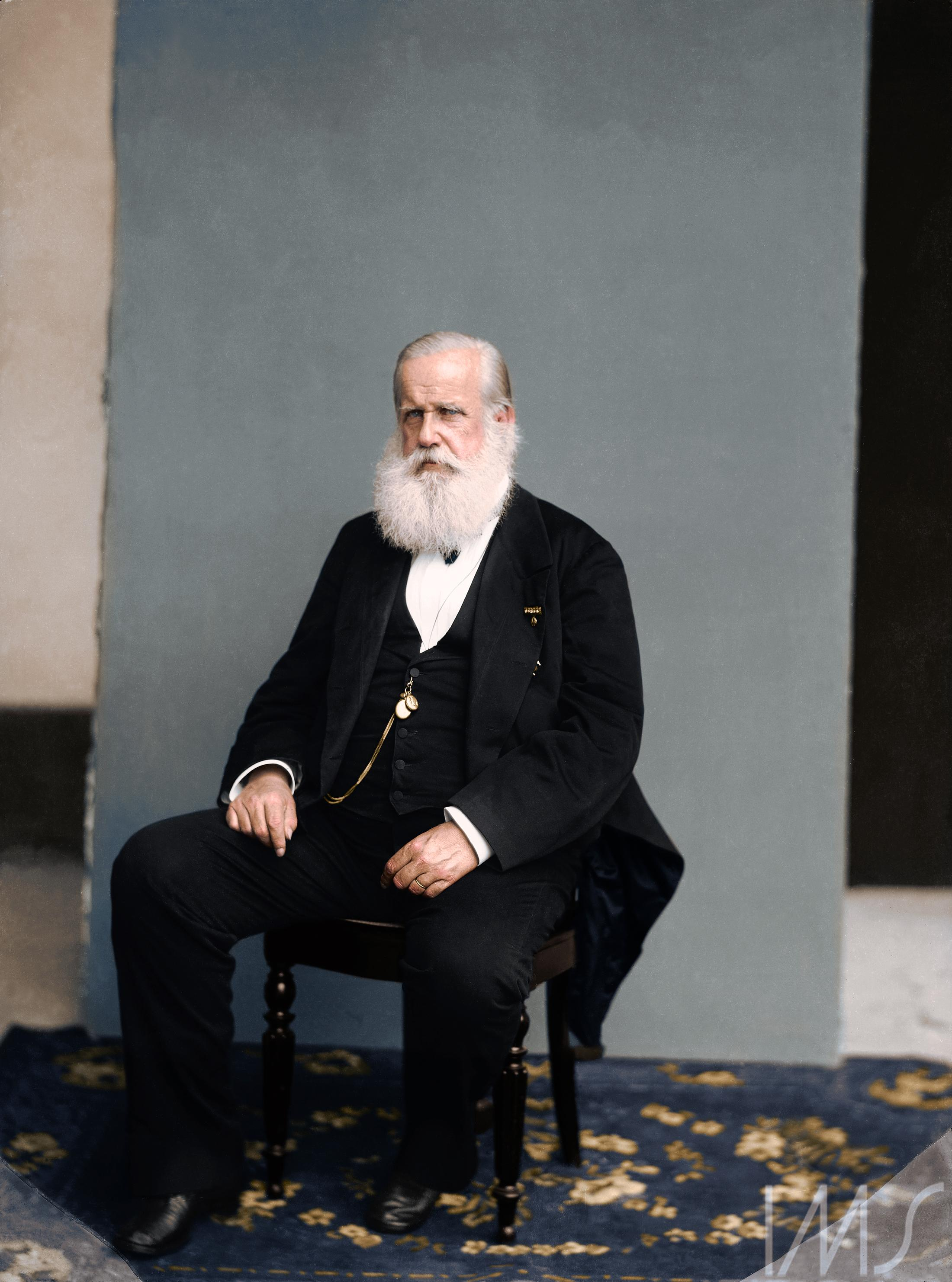 O Imperador Dom Pedro II governou o Brasil por 49 anos, entre 1840 a 1889. Foto colorizada artificialmente.